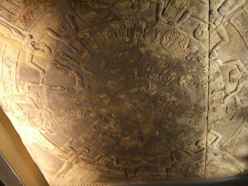 Zodiaque de Denderah - Période ptolémaïque et romaine - Musée du Louvre